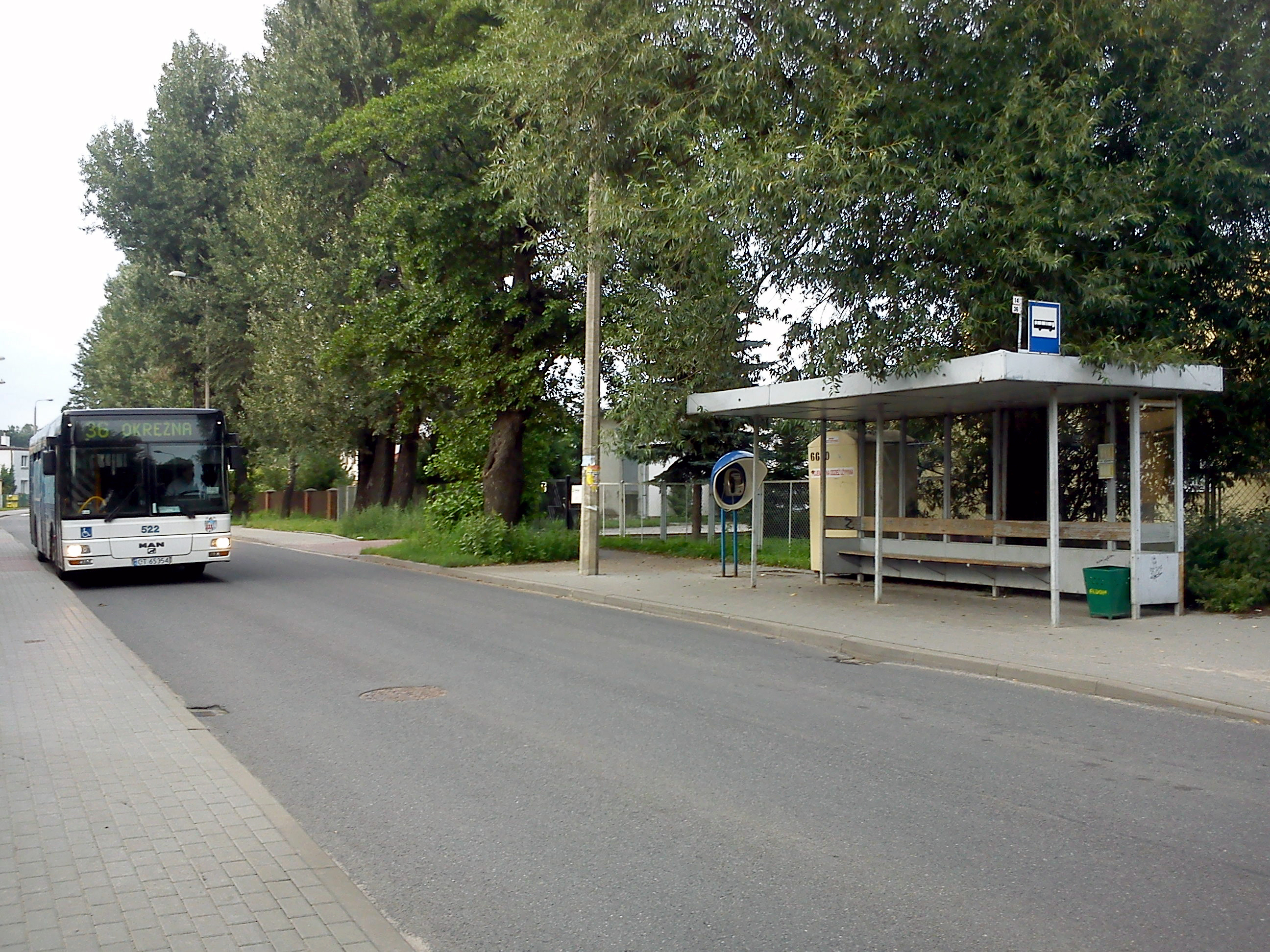 Przystanek MZK Toruń o nazwie Brązowa przy ulicy Karola Kniaziewicza w Toruniu.